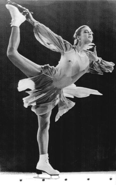 Katarina Witt ADN-ZB AP-Tele-2.4.87 USA: Katarina Witt in Washington stürmisch gefeiert- Mit Ovationen und unzähligen Blumen wurde die dreifache Weltmeisterin und Olympiasiegerin im Eiskunstlaufen Katarina Witt aus der DDR am Abend des 1.4.87 von Tausenden begeisterten Einwohnern Washingtons gefeiert. Ihre Darbietungen und vom Publikum nachdrücklich geforderten Zugaben bildeten den Höhepunkt des Schaulaufens der Meister und Plazierten der Weltmeiserschaften im Capital Center der USA-Hauptstadt. -Siehe dazu Foto 28N sowie dreiteilige ADN-Meldung vom 2.4.87